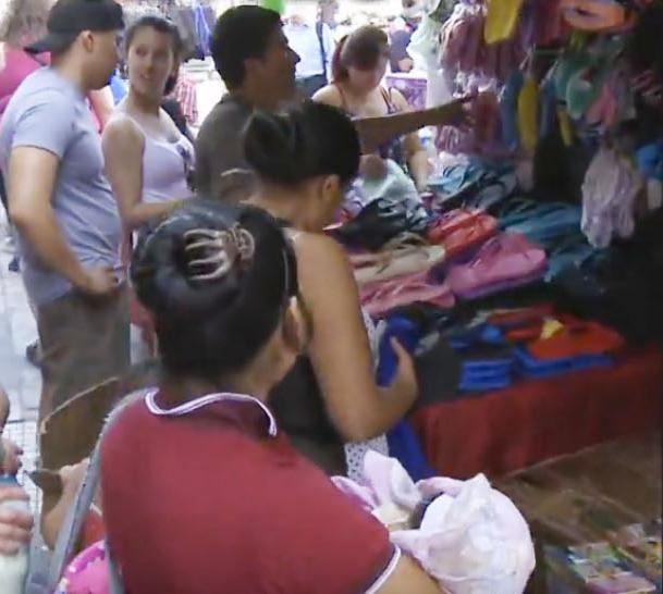 Manteros en el barrio de Once, Buenos Aires